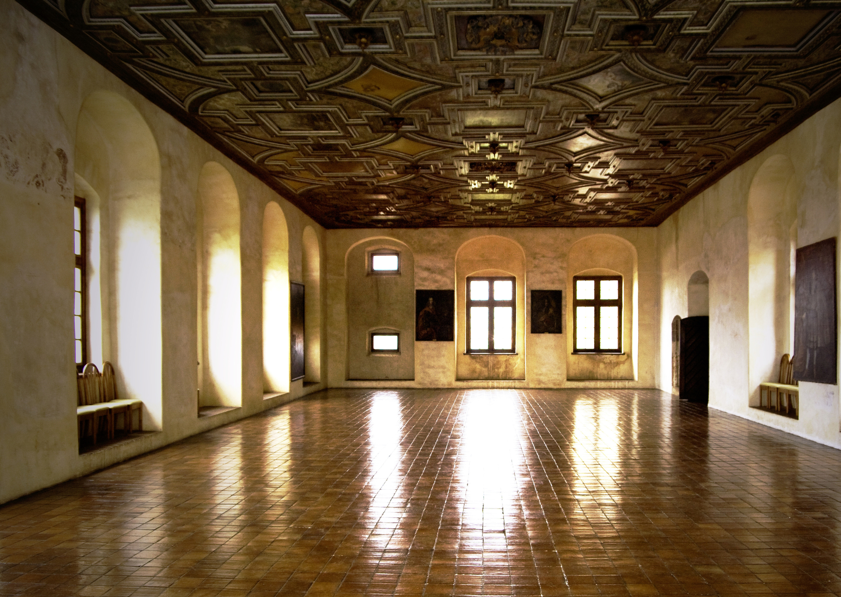 Hrad Švihov, Švihov.